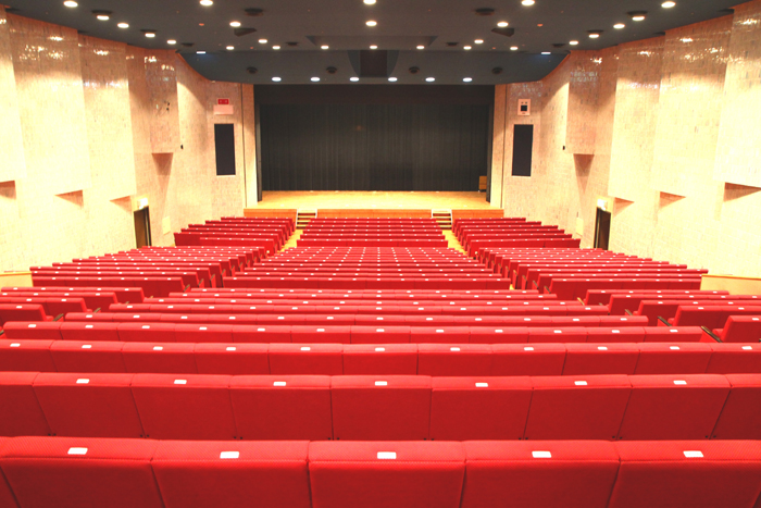 ニッショーホール